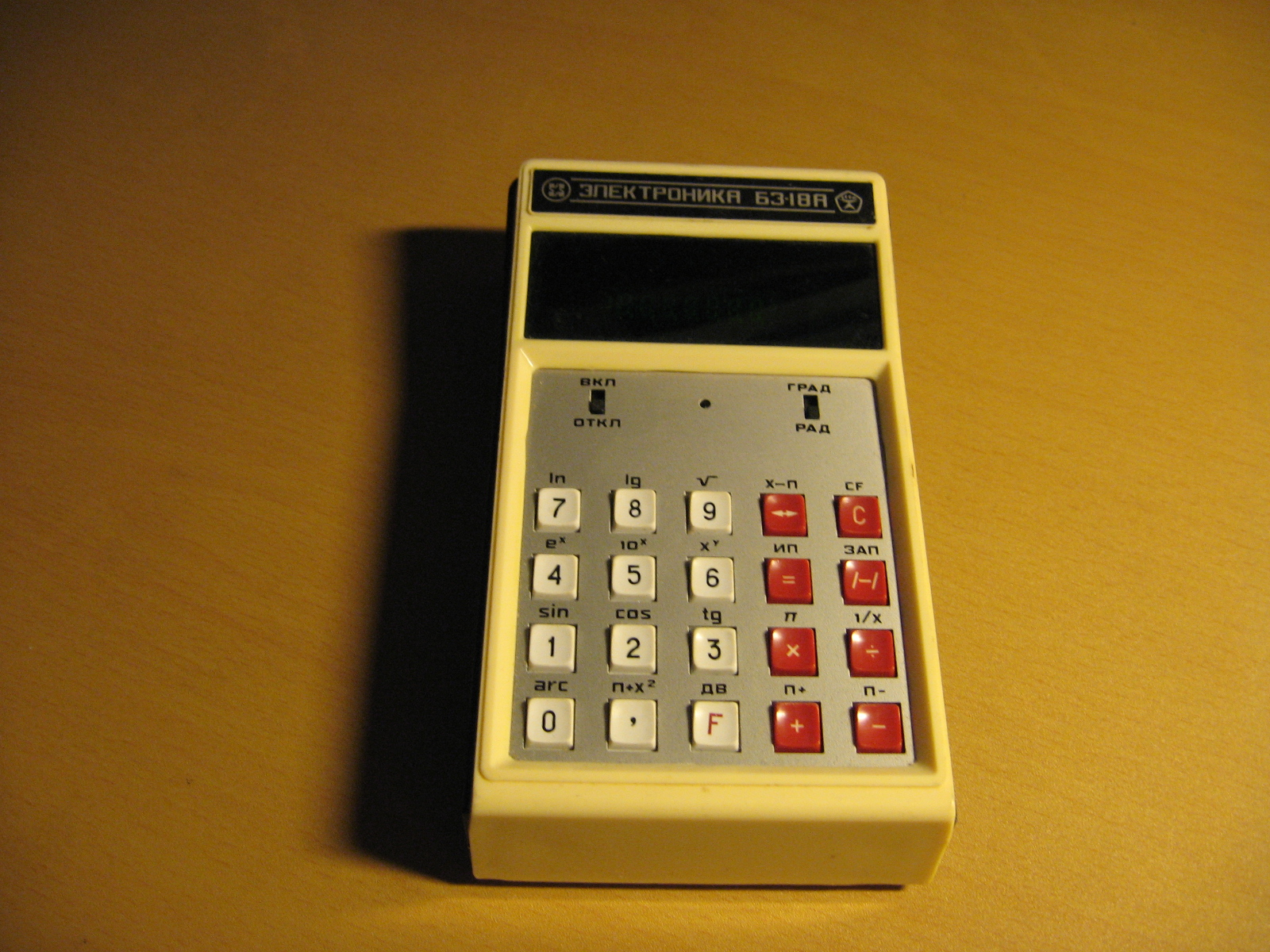 NSVL kalkulaator